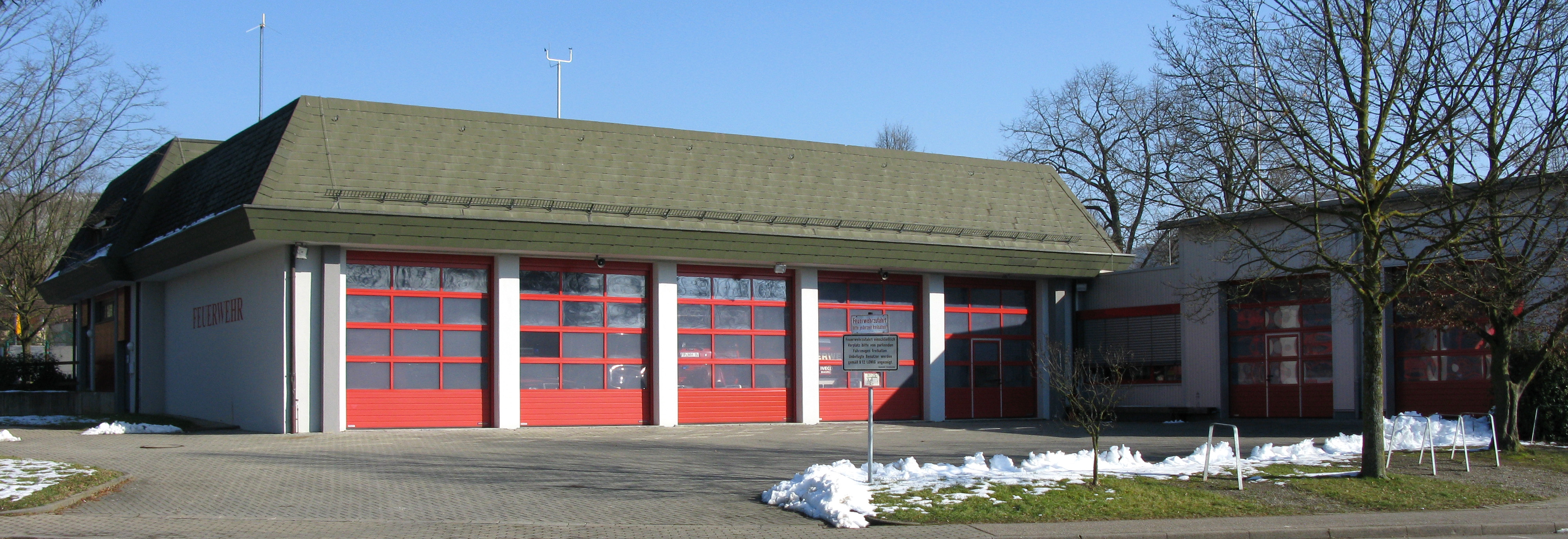 Feuerwache von Ehrenkirchen